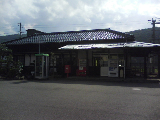 養父駅駅舎（2009/8/16撮影）